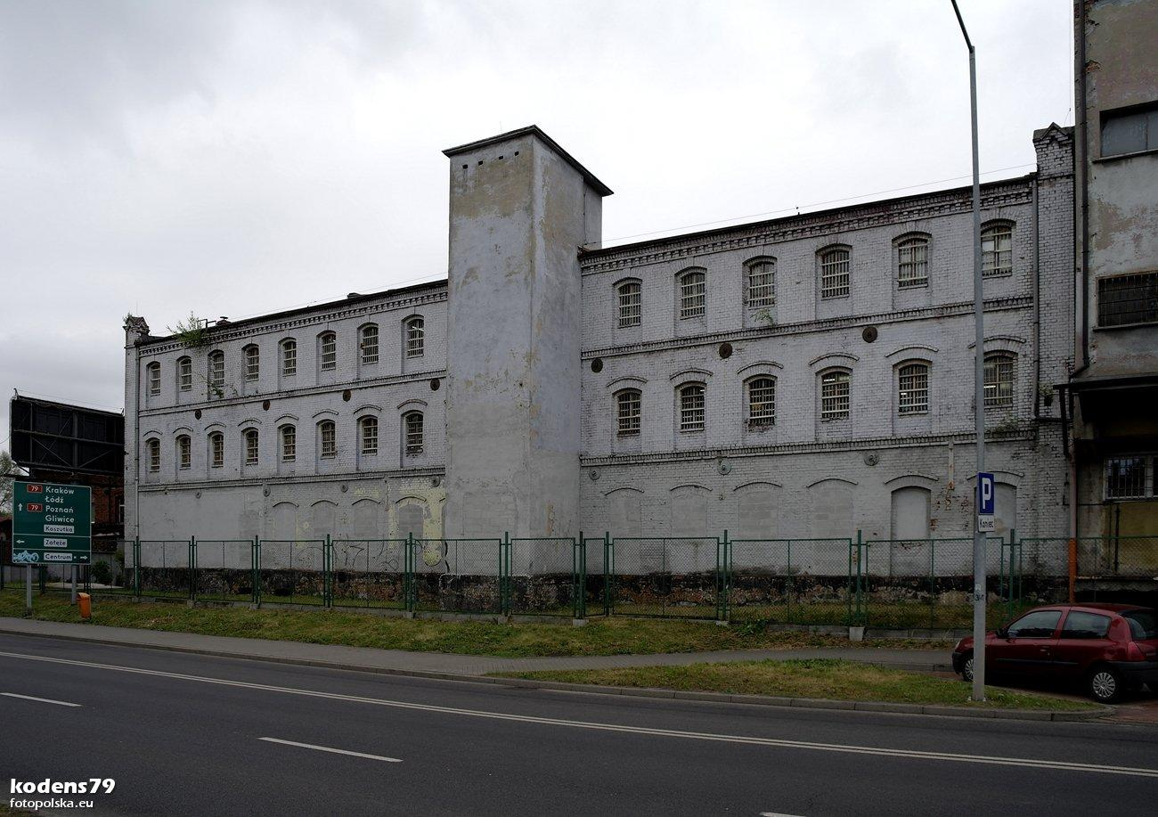 Magazyn widoczny z ulicy Marii Goeppert-Mayer